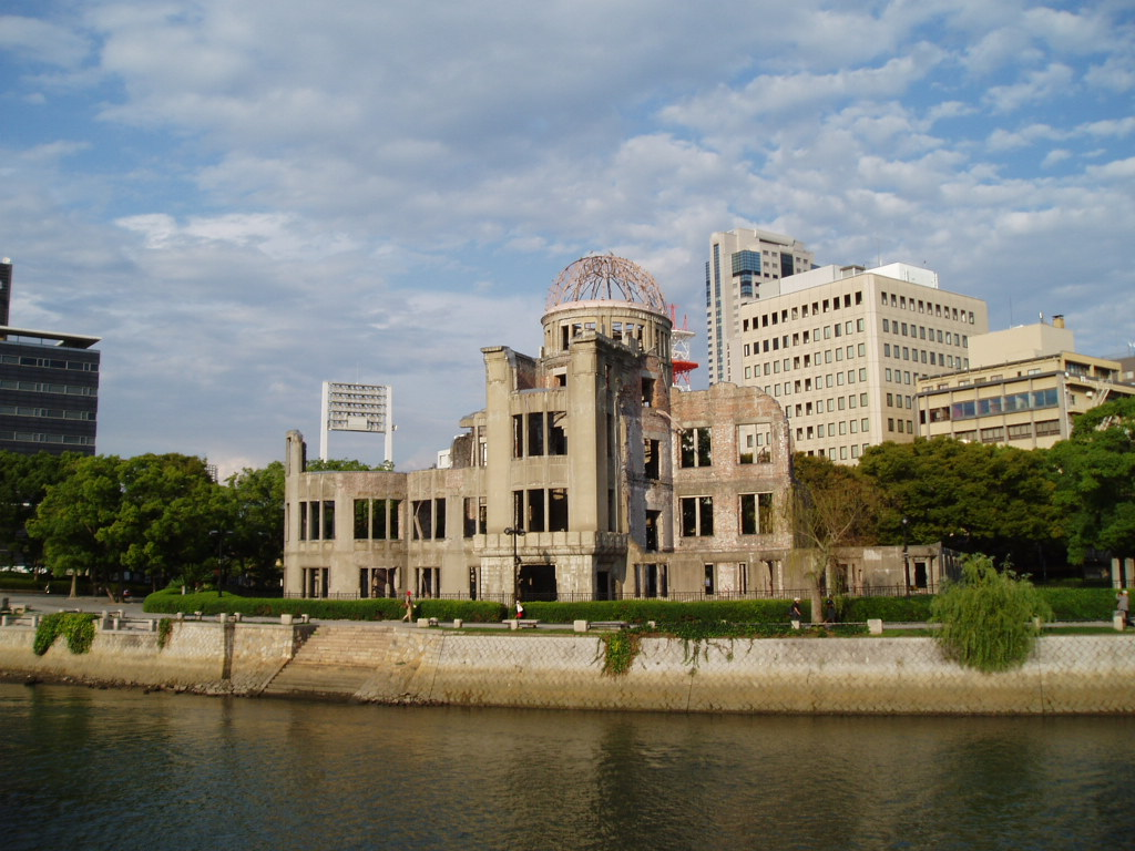 原爆ドーム。広島県広島市。